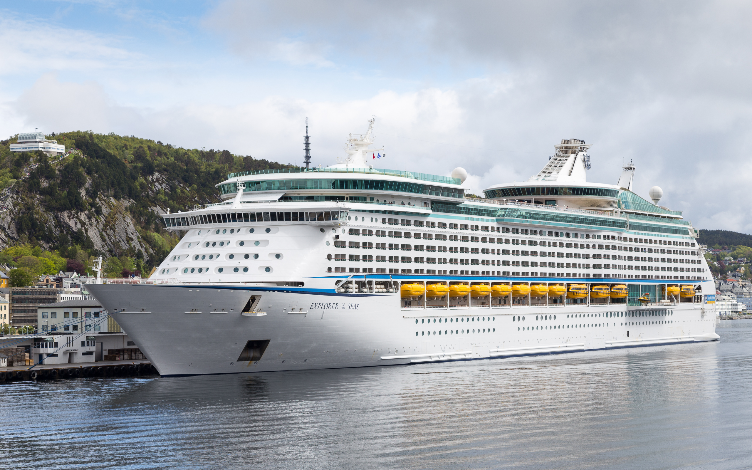 Explorer of the Sea in Ålesund